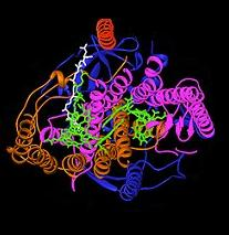 Реакционный центр фотосинт. бактерий